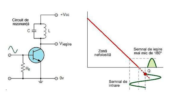 schema electrica si reprezentare grafica a unui amplificator in clasa C